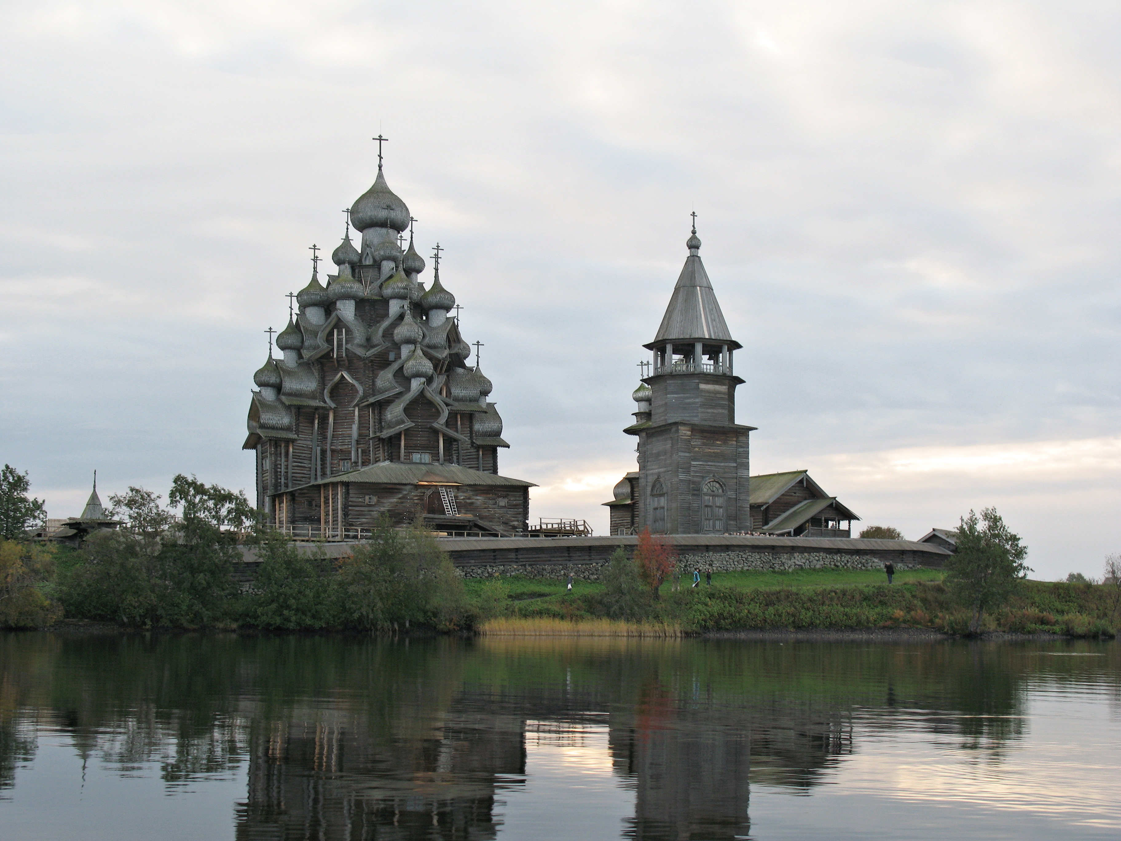 Церковь Преображения Господня (Республика Карелия, Медвежьегорск, о. Кижи, музей-заповедник деревянного зодчества "Кижи")